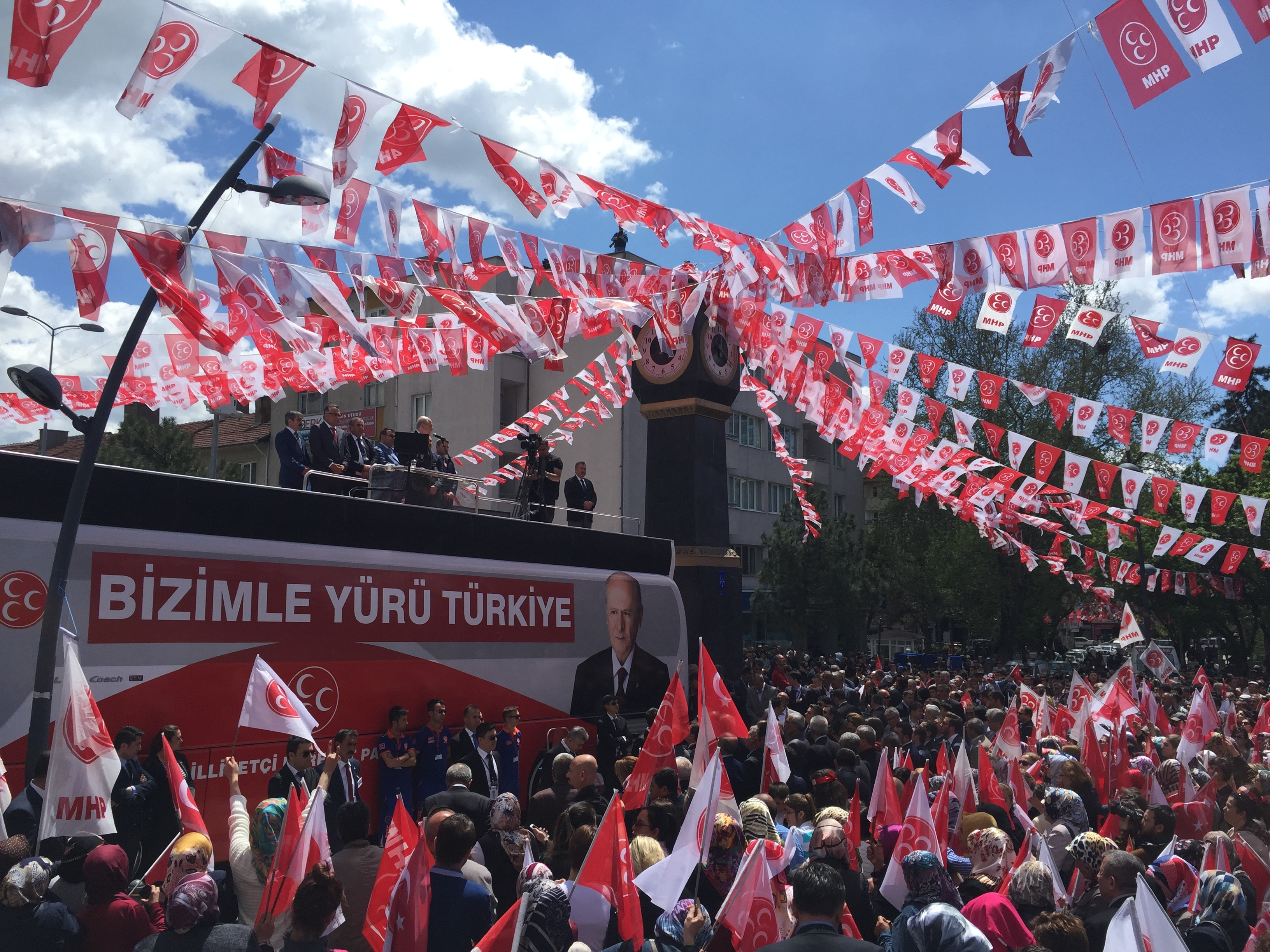 Chairman of Nationalist Movement Party, Devlet Bahçeli at the Ankara rally